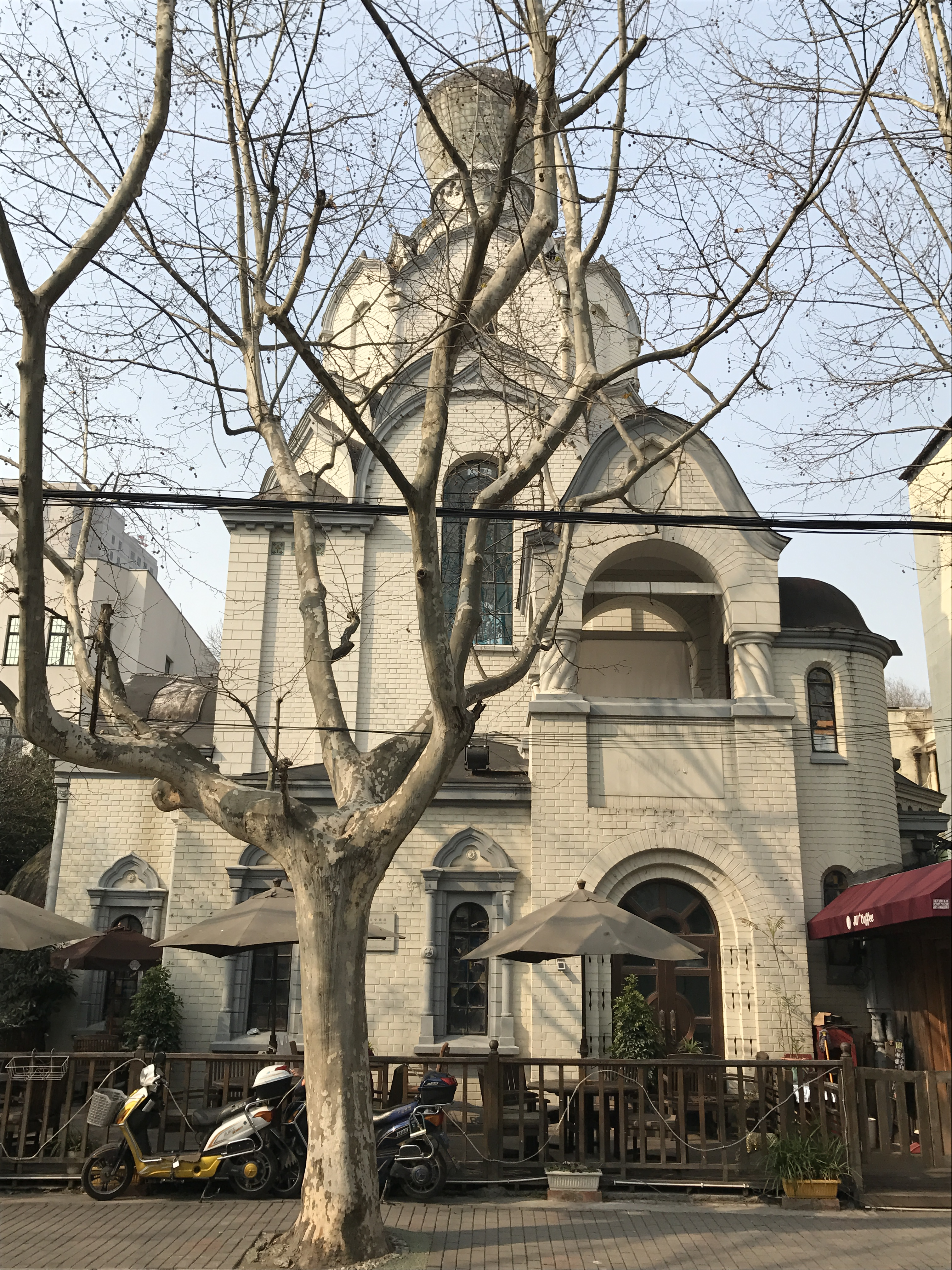 圣尼古拉斯教堂旧址 皋兰路16号